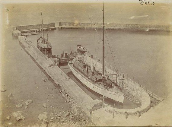 Le Roland dans son bassin de radoub en 1895 à Banyuls-sur-Mer (Pyrénées-Orientales, France).